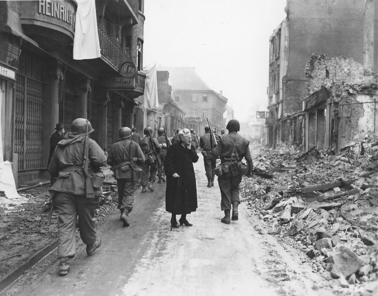 Troops moving through Bensheim 1945", 27. März 1945. In der Bildmitte die 64-jährige Anna Mix, geborene Hesch, auf der Bensheimer Hauptstraße. Links und rechts Soldaten des 180. Infanterie-Regimentes der 45. Division der US-Army. Anna Mix blickt fassungslos auf die Trümmer des Hauses ihrer Schwester in Bensheim (Tabakwarenhandlung Margaretha Hesch). An beiden Seiten der Hauptstraße sind Trümmer zerstörtet Häuser zu sehen. Aus den Fenster hängen weiße Fahnen zum Zeichen der Kapitulation.